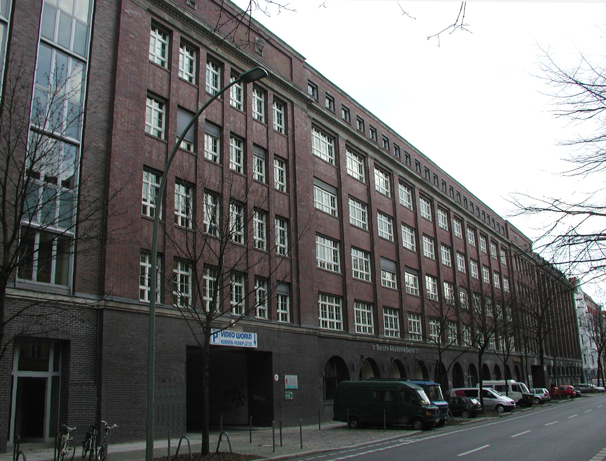 Stammhaus Knorr-Bremse in Berlin, Neue Bahnhofstraße (2)